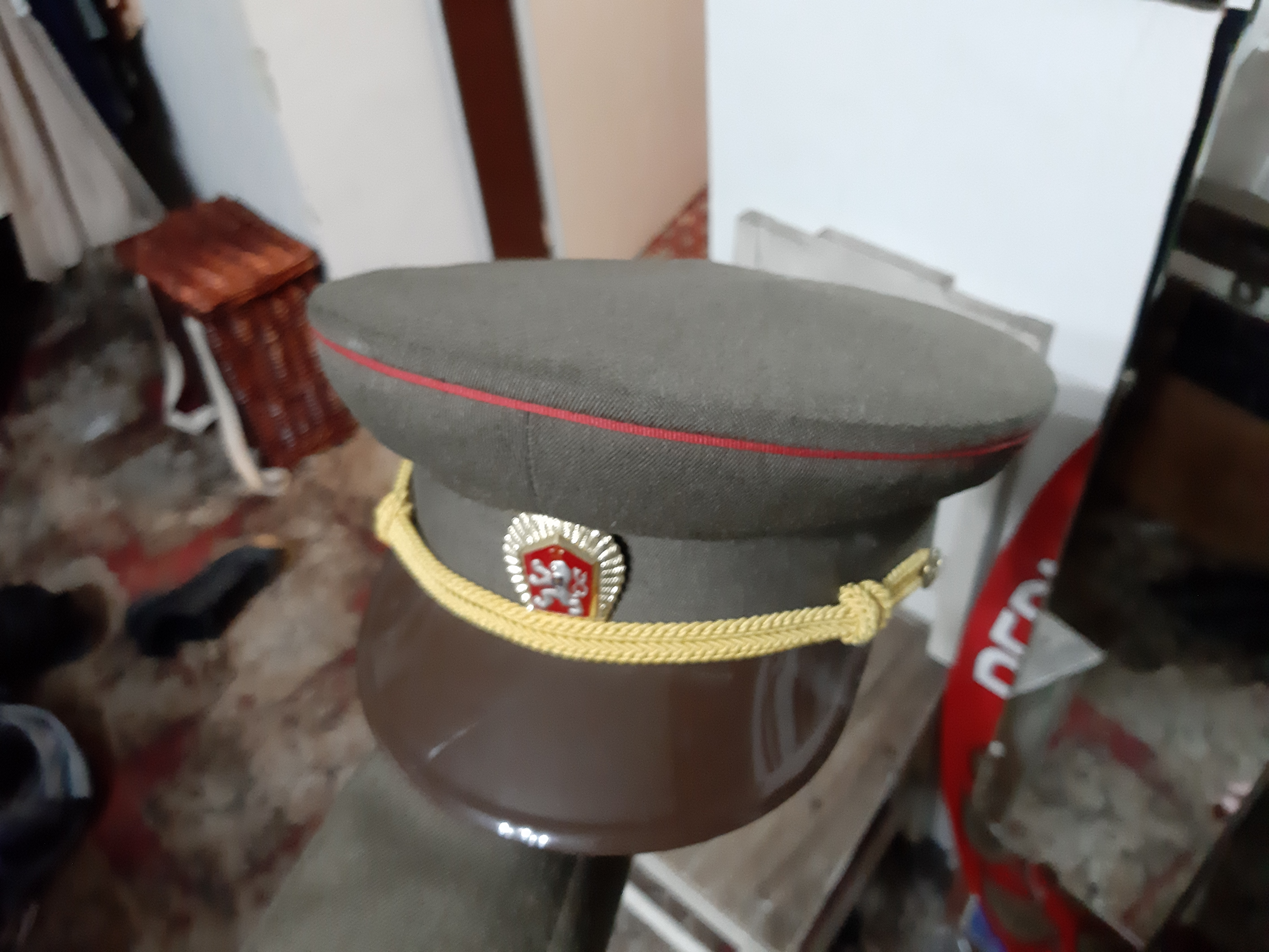 Čepice k uniformě vzor 63.